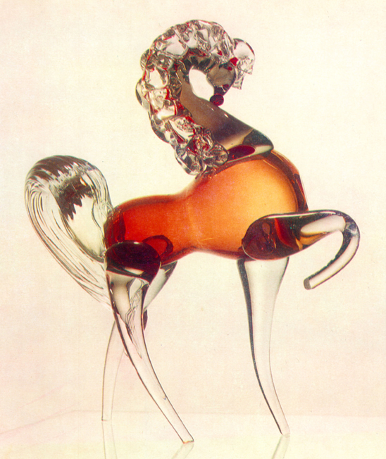 стекло